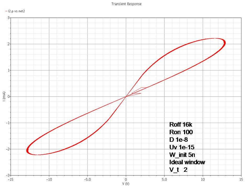 אופיין מתח זרם של ממריסטור נשלט מטען ובעל מתח סף בזרם חילופין